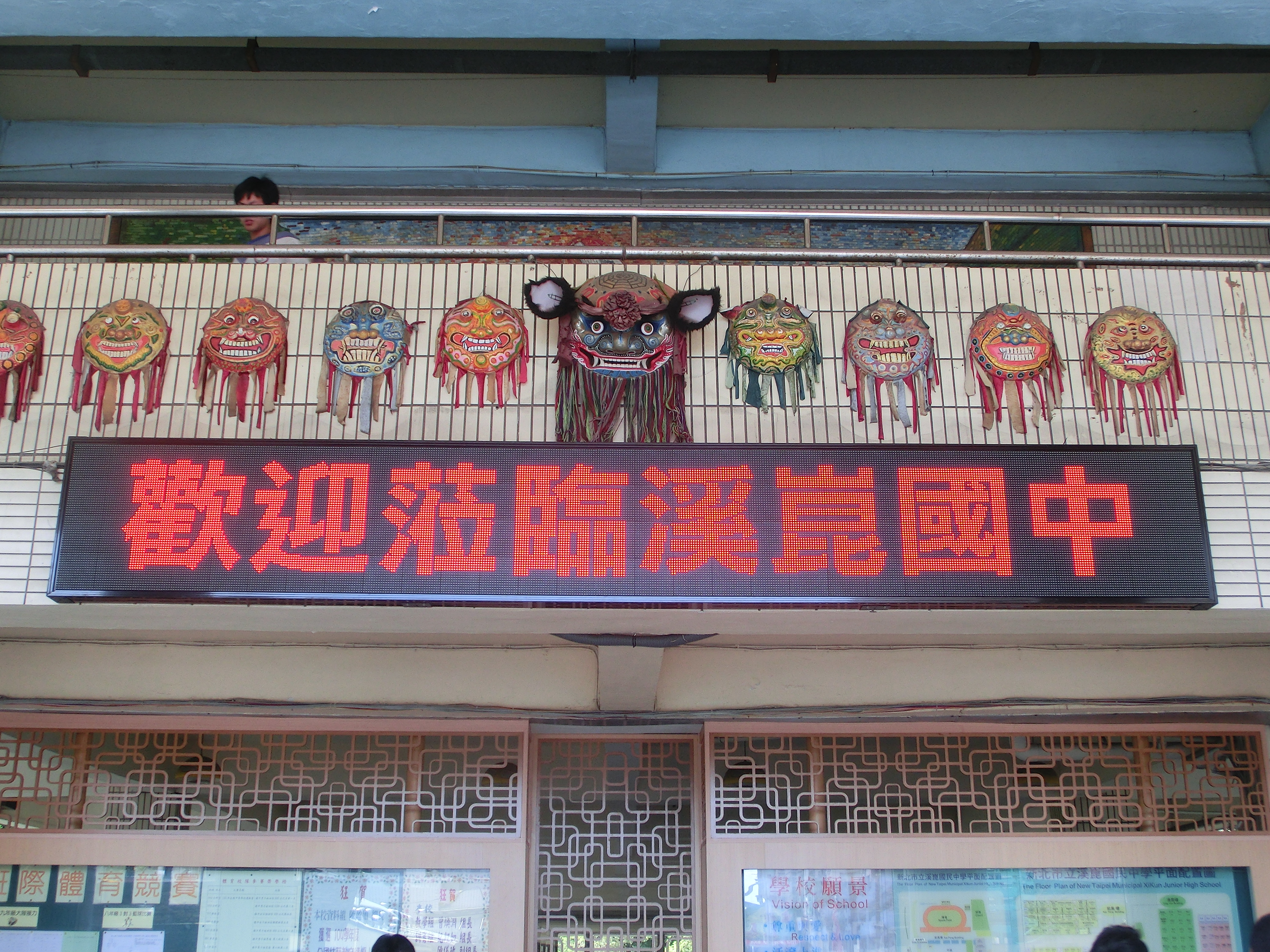 中文（台灣）: 溪崑國中校門口全新的LED跑馬燈